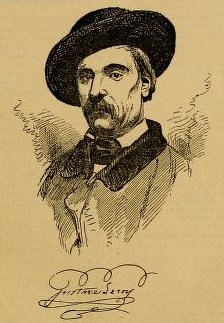 Portrait du goguettier Gustave Leroy (1818-1860)